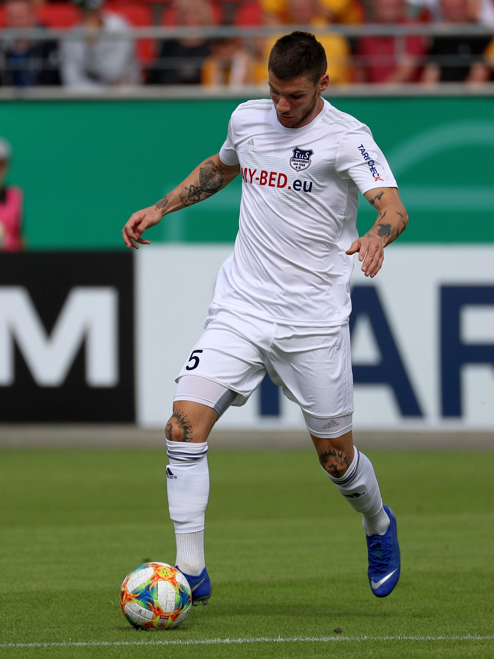 DFB-Pokal 2019/20, 1. Hauptrunde, TuS Dassendorf gegen SG Dynamo Dresden 0:3 (0:1)